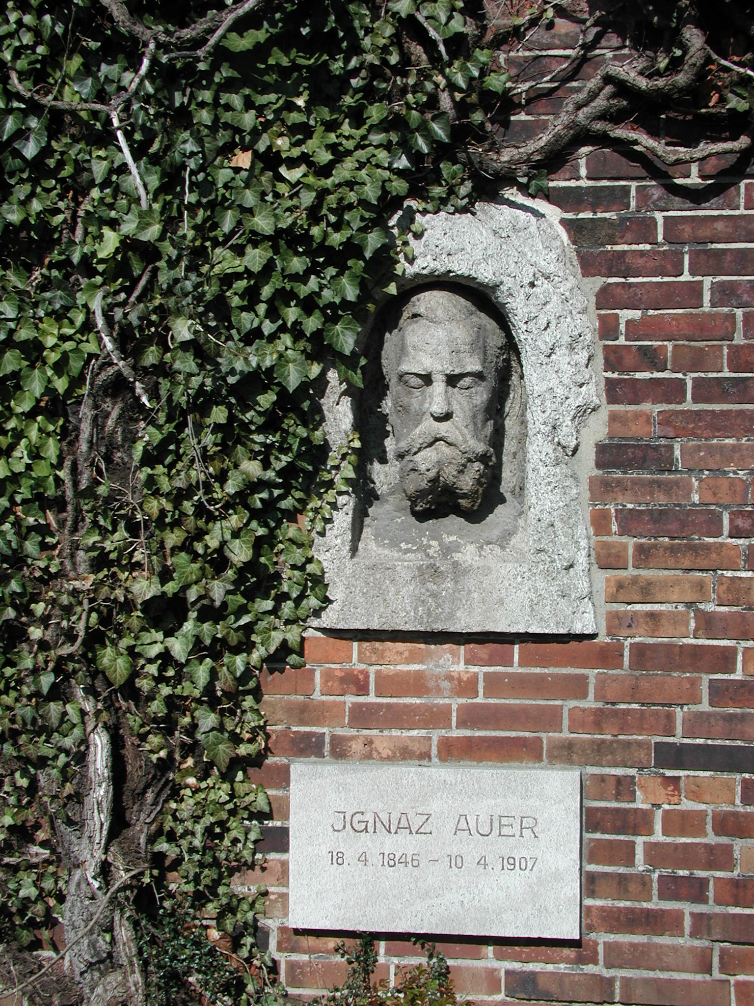 Die Grabplatte an der Ringmauer auf dem Friedhof in Berlin